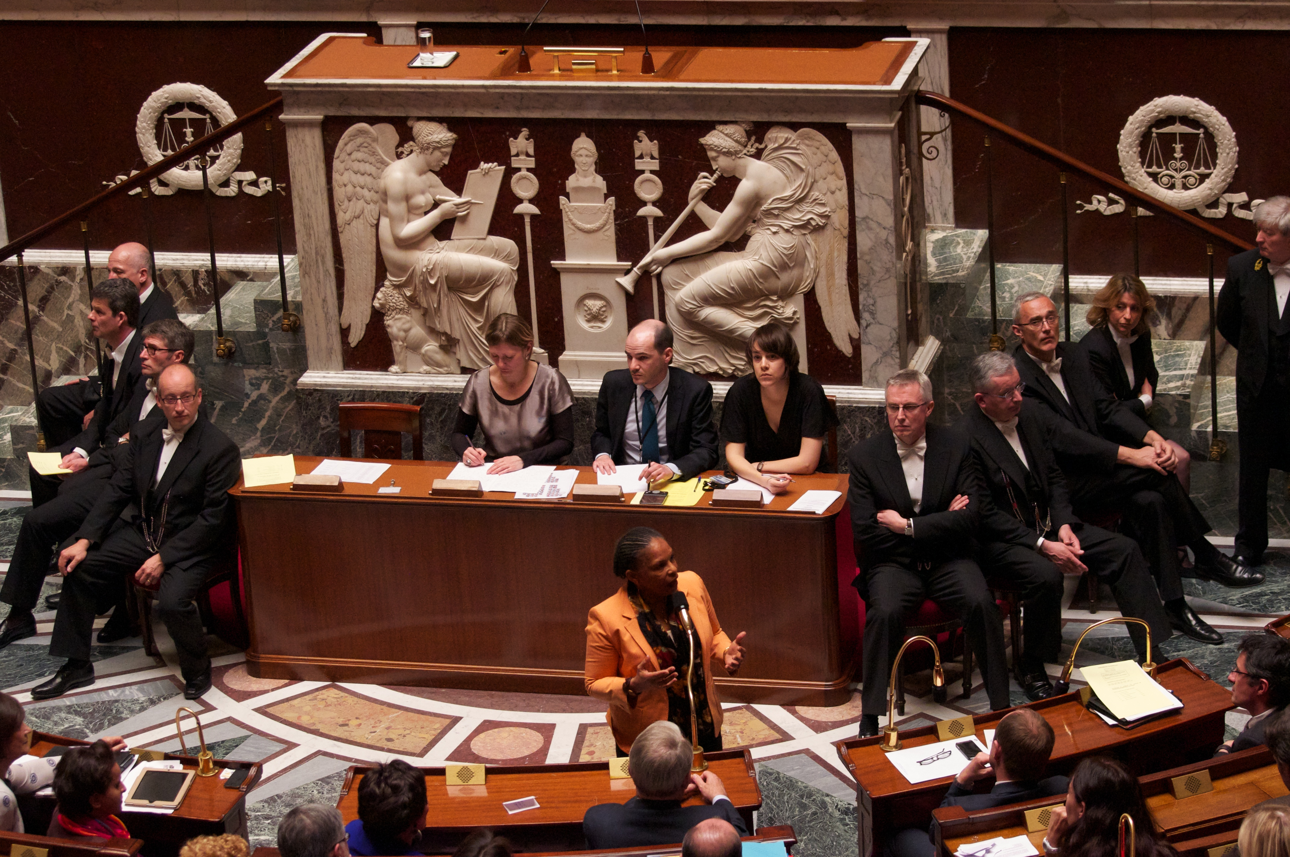 Discours de Christiane Taubira après le vote solennel de la loi ouvrant le mariage aux couples de personnes de même sexe - Assemblée nationale